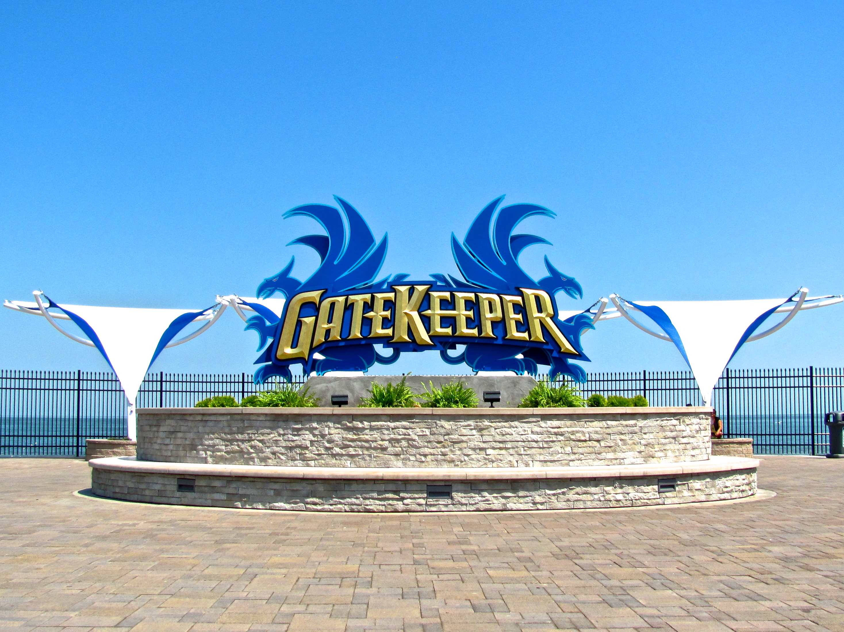 Cedar Point 068